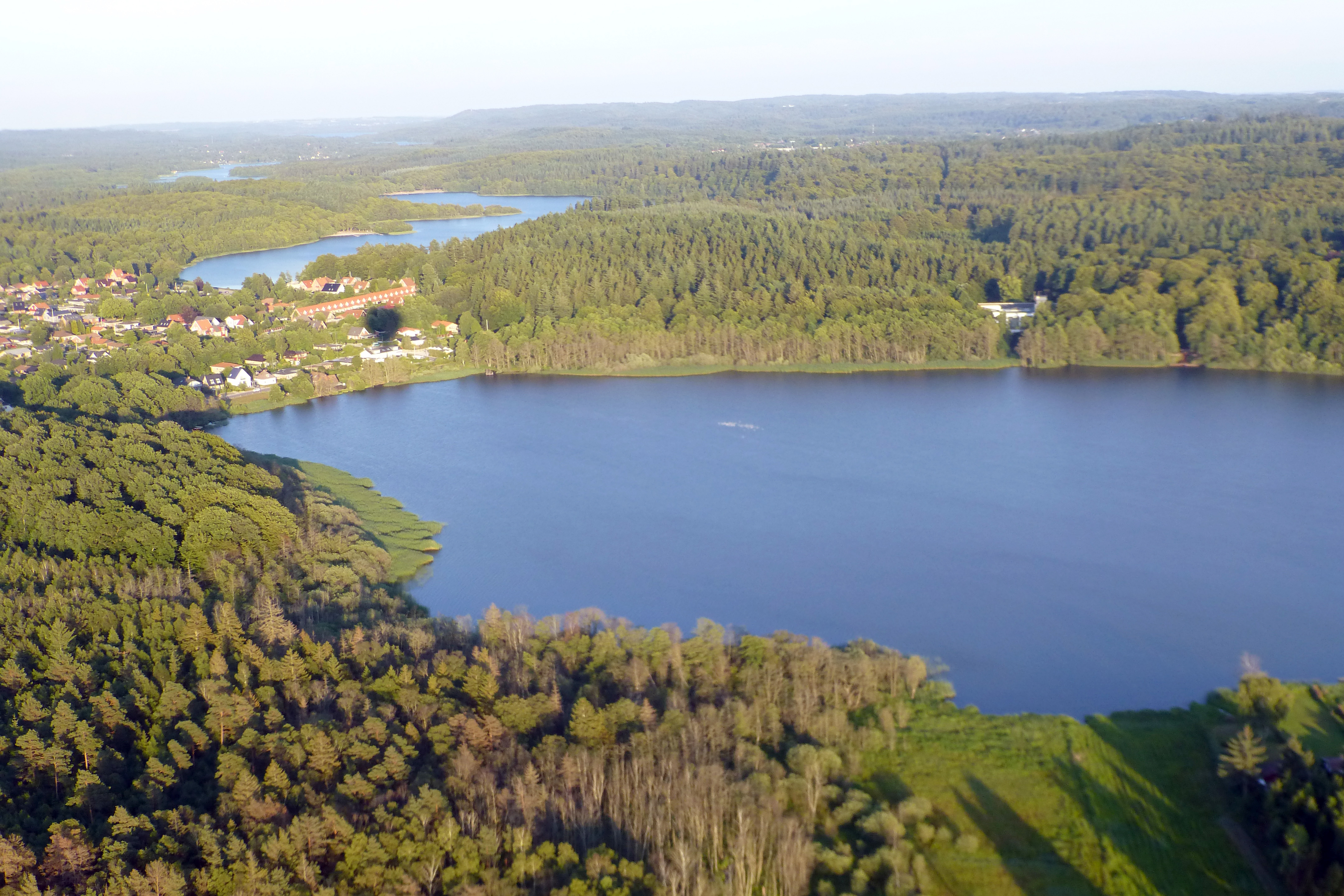 Ørnsø set mod sydøst